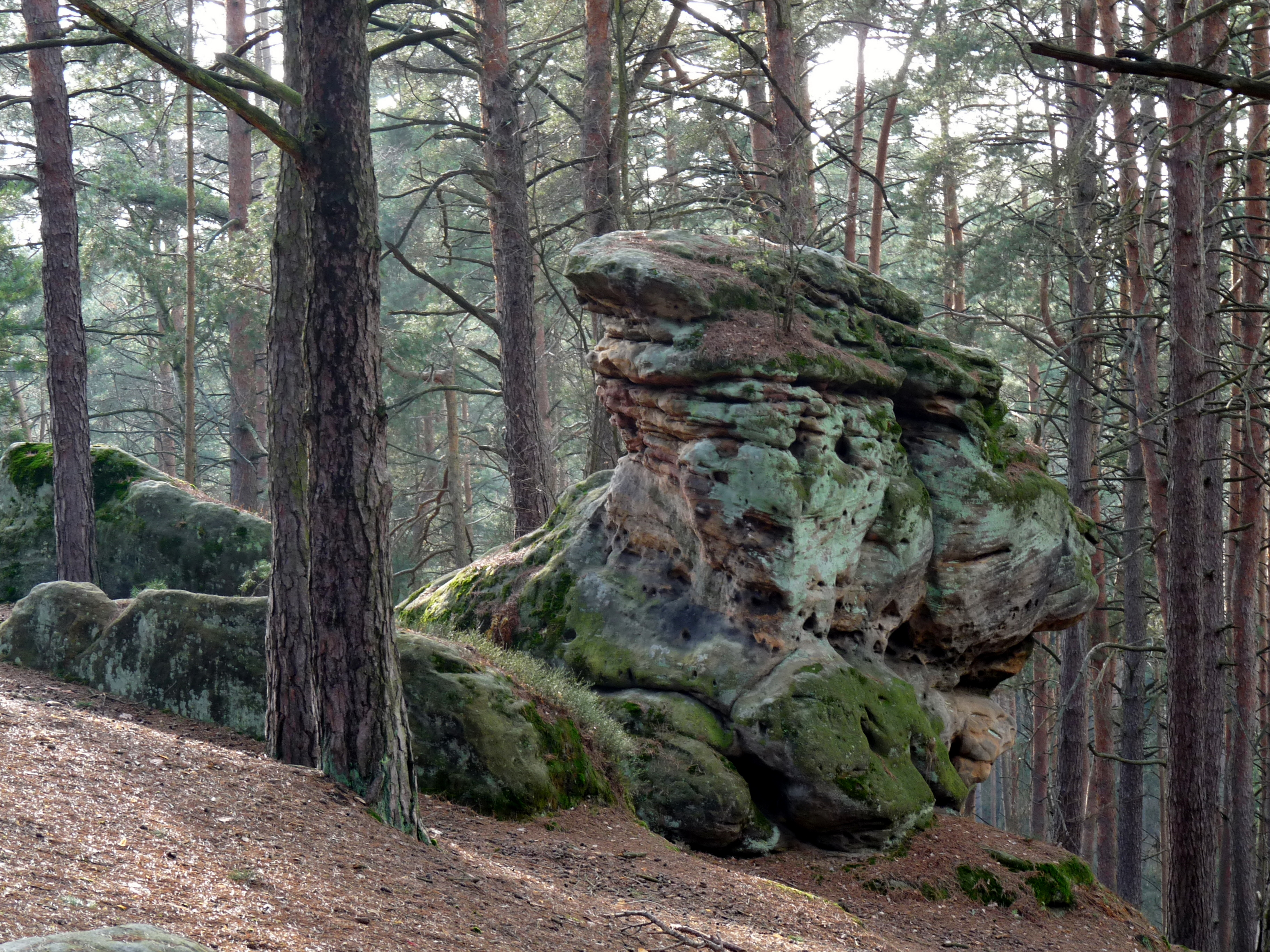 Bayreuth - Naturdenkmal Buchstein (Geotop-Nummer: 462R001)